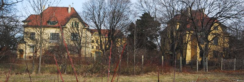 Gaswerk Leopoldau - Wohn- und Verwaltungsgebäude, leider hinter Bäumen versteckt